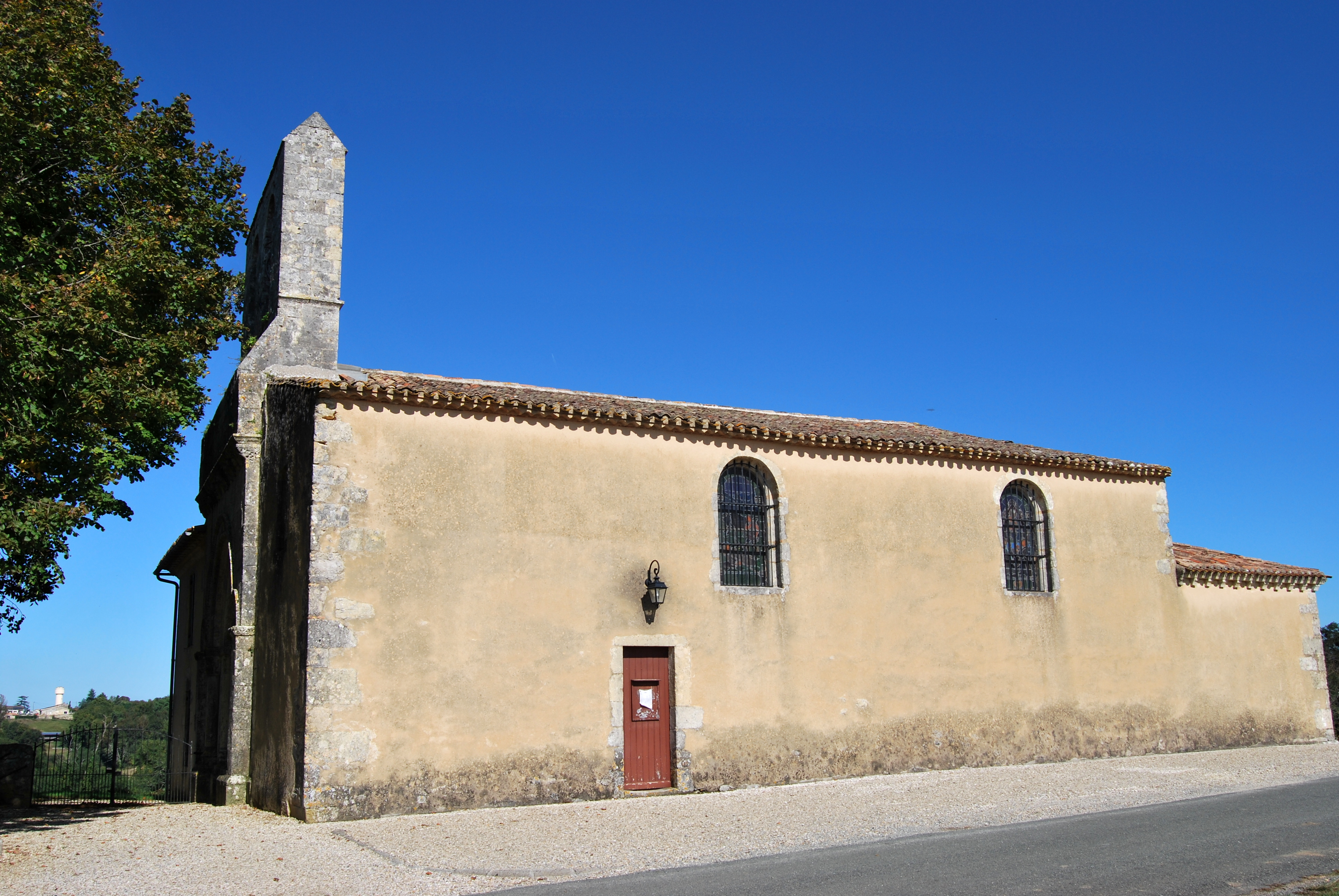 Église Saint-Saturnin (Cardan)